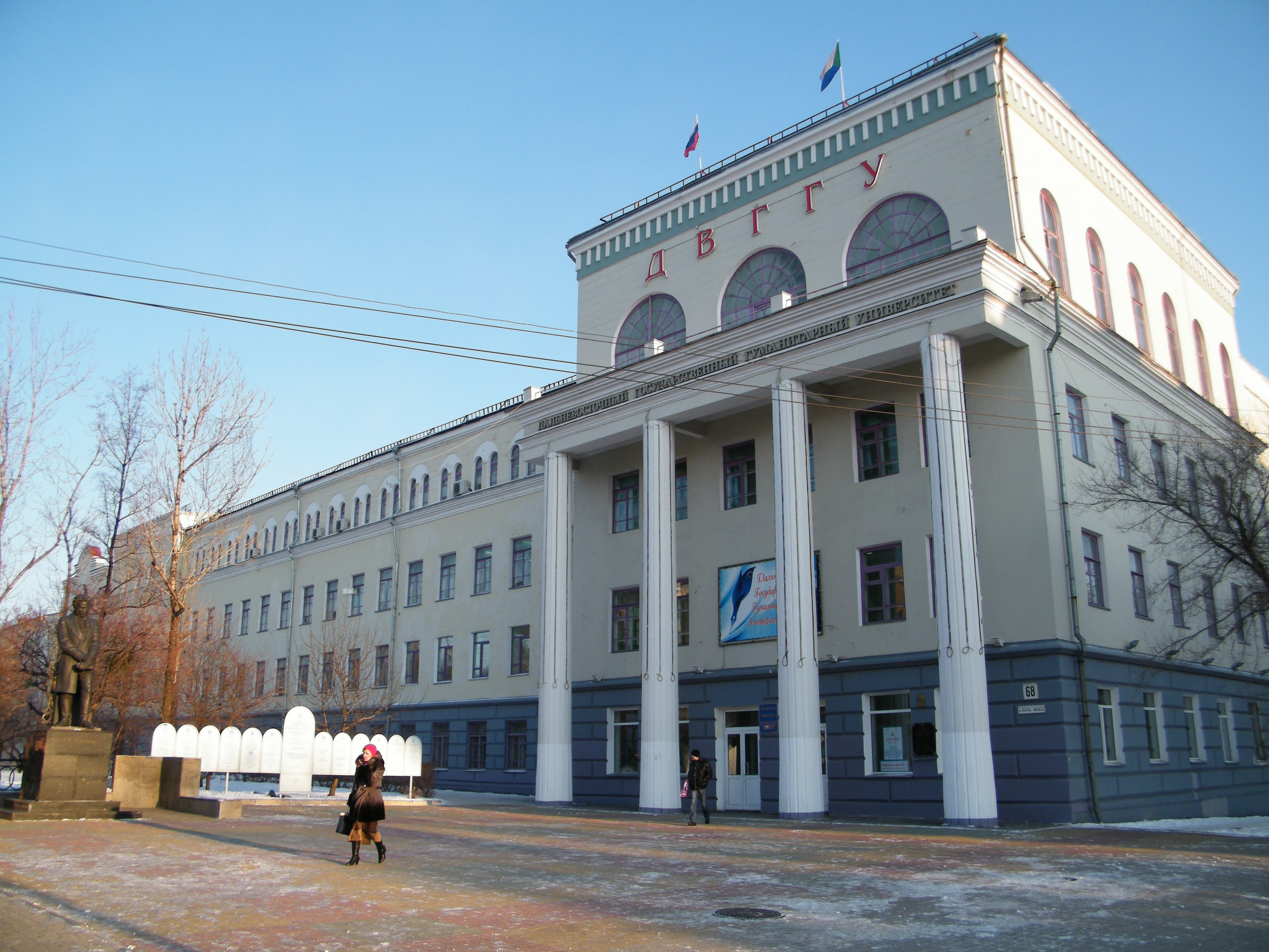 Дальневосточный государственный гуманитарный университет